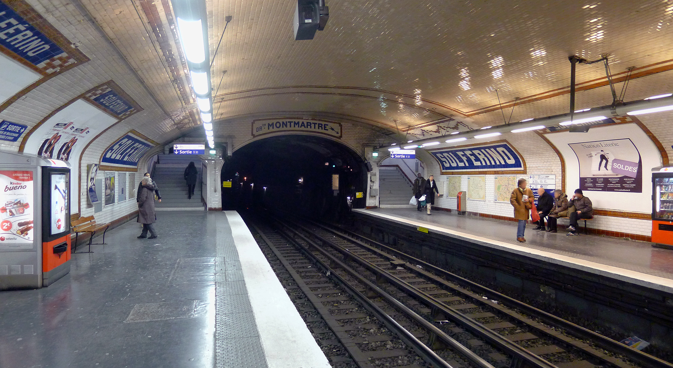 Ligne de métro n°12, station Solférino - Paris VII